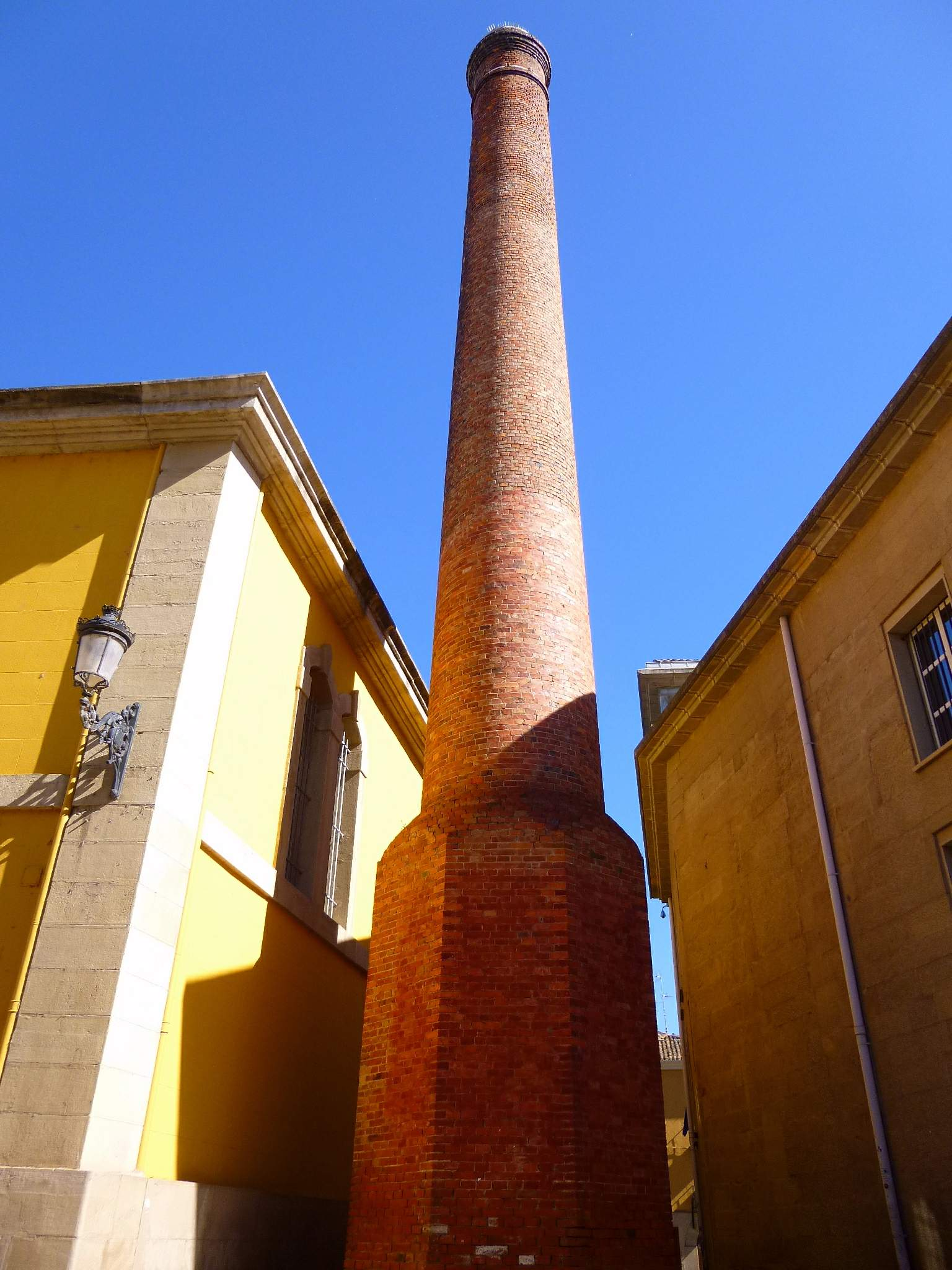 Antigua Fábrica de Tabacos de Logroño